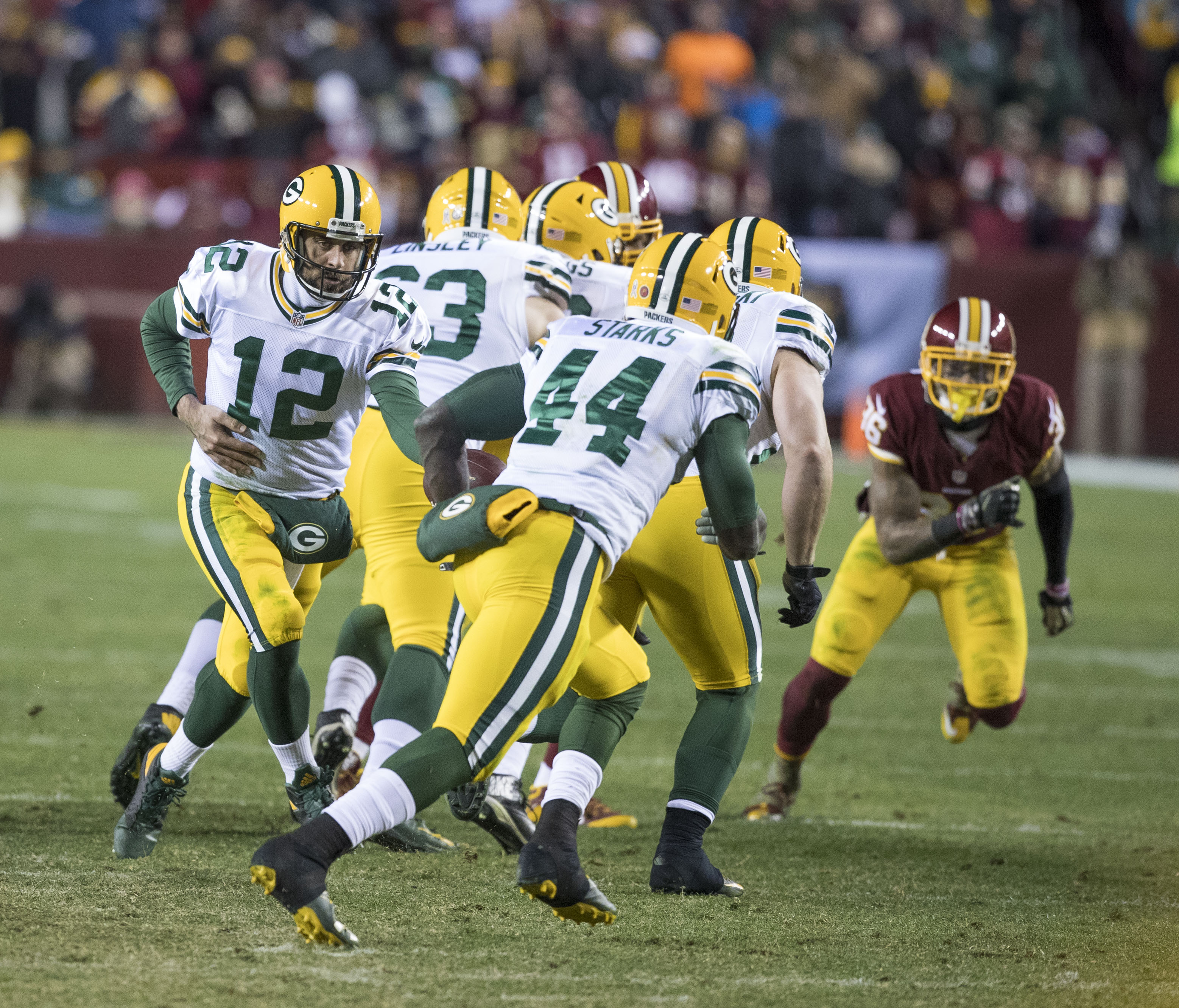 Packers at Redskins 11/20/16